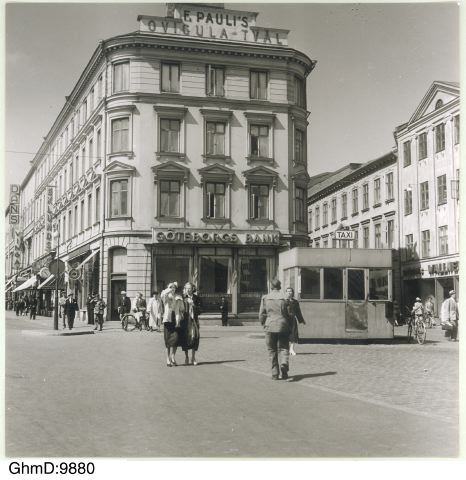 Göteborgs Bank vid Kungstorget 8-9 i Göteborg, fotograf Eric Månsson, 1951. Orginalfotot i Göteborgs stadsmuseums bildsamling.